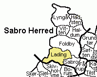 Kort der viser Lading Sogn, Sabro Herred, Århus Amt, Denmark.